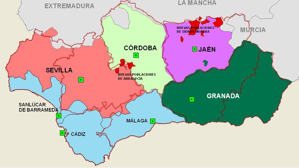 Provincias andaluzas tras la creación de las provincias marítimas (1799-1804).